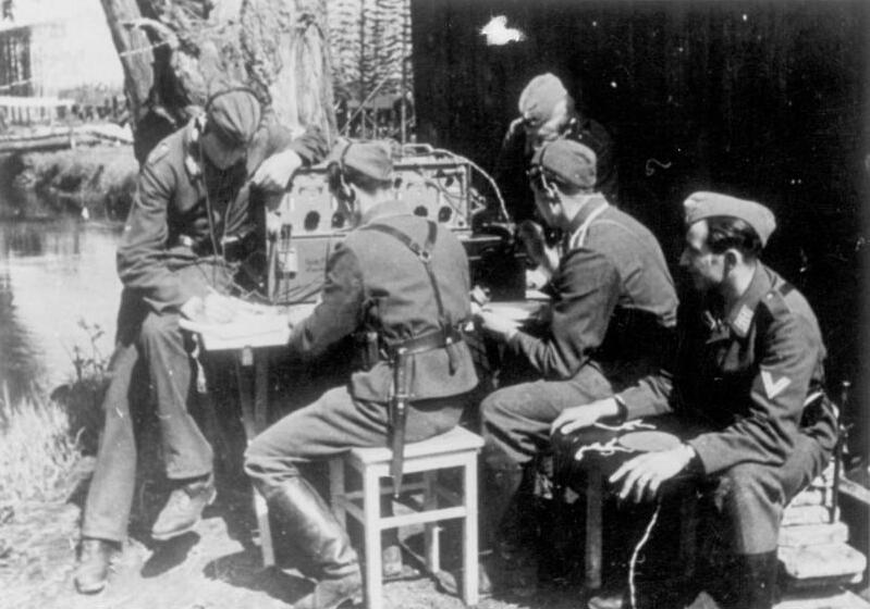 Funkstelle des Gefechtsstandes einer Kampffliegertruppe. 12.05.40 Bildberichter: Kindt P.K. 20/2